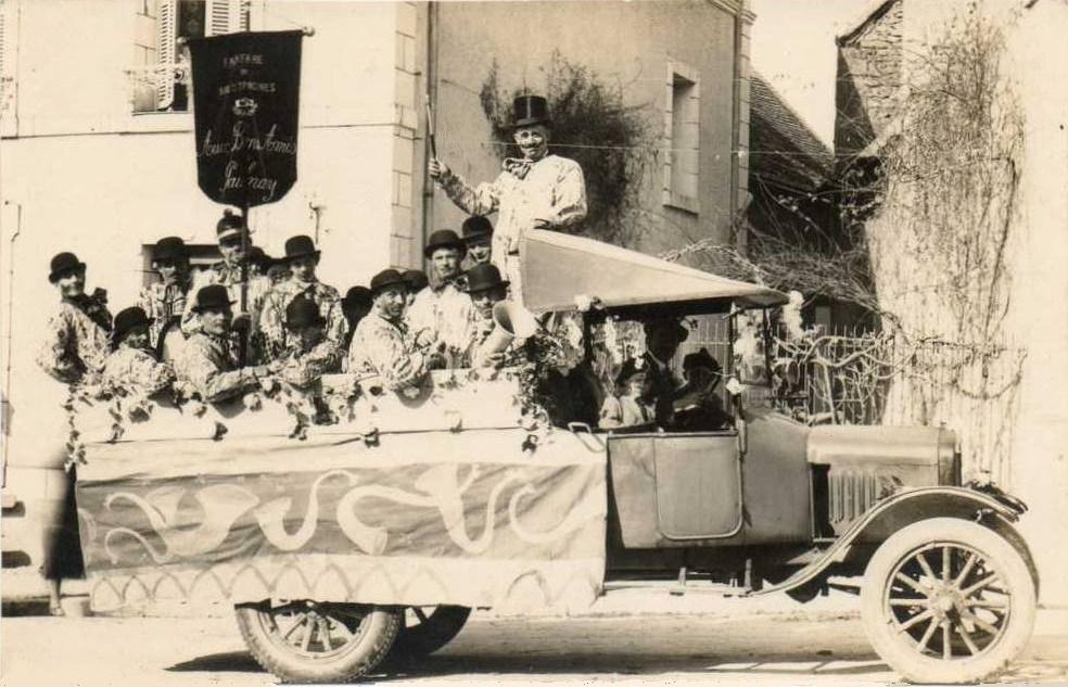 La fanfare de Bigotphones "Aux Bons Amis Paulnay".